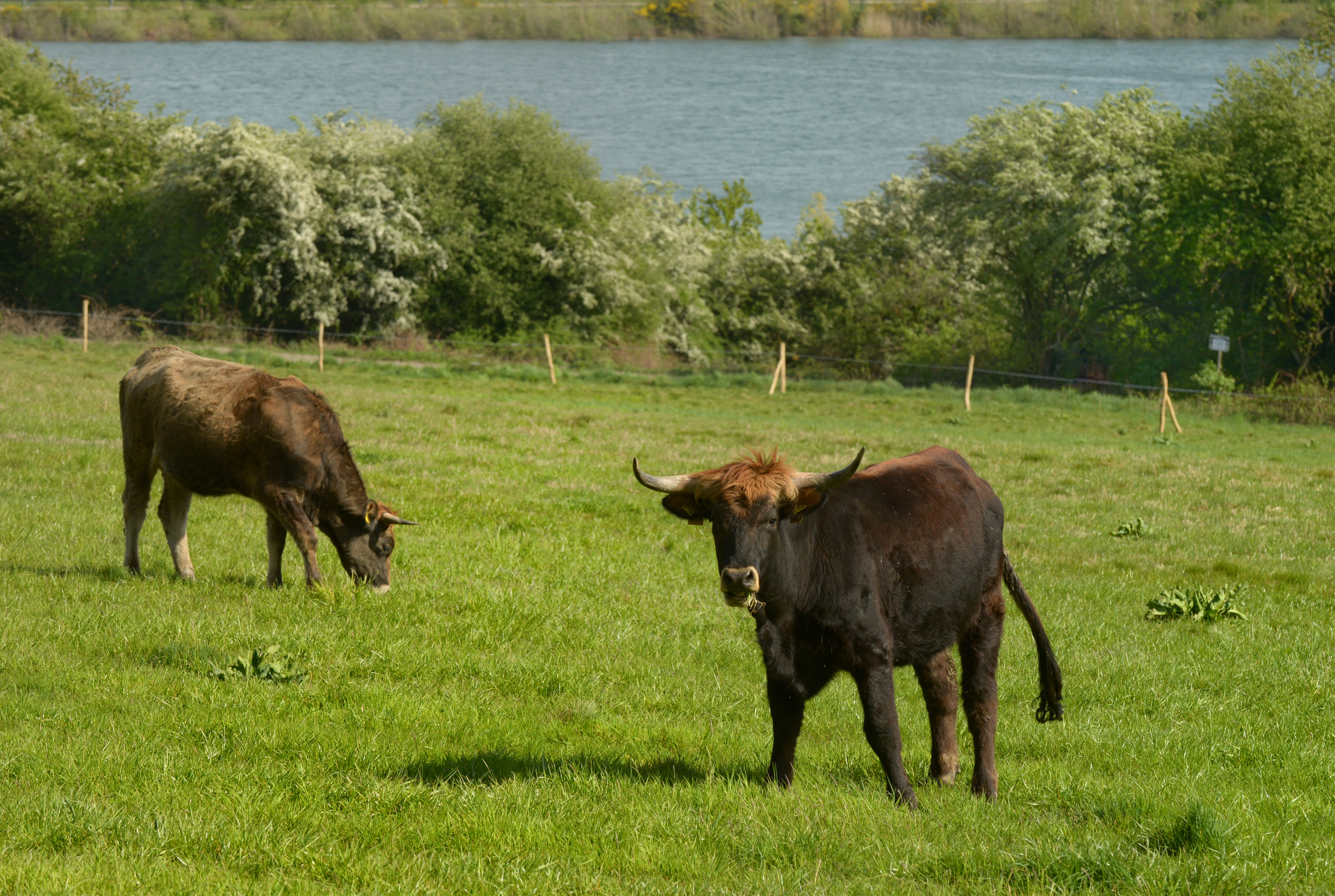 Taurusrinder des Naturschutzgroßprojektes LIK.Nord am Schlammweiher Hahnwies, Illingen, Saarland/ Deutschland (2020). Durch die Ganzjahr-Beweidung soll die Landschaft offengehalten und das Artenreichtum an Pflanzen, Insekten und Vögeln gefördert werden.